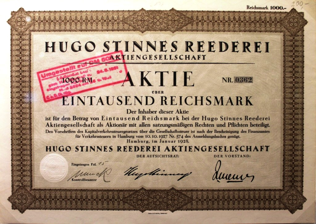 Aktie Hugo Stinnes Schiffahrt